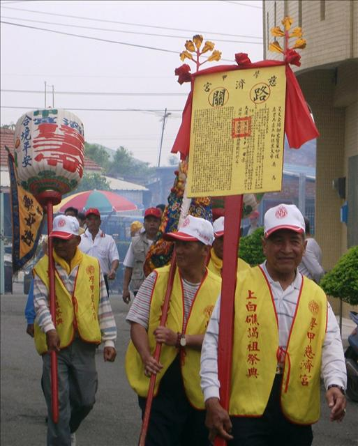 2007學甲上白礁頭旗、頭燈、路關牌